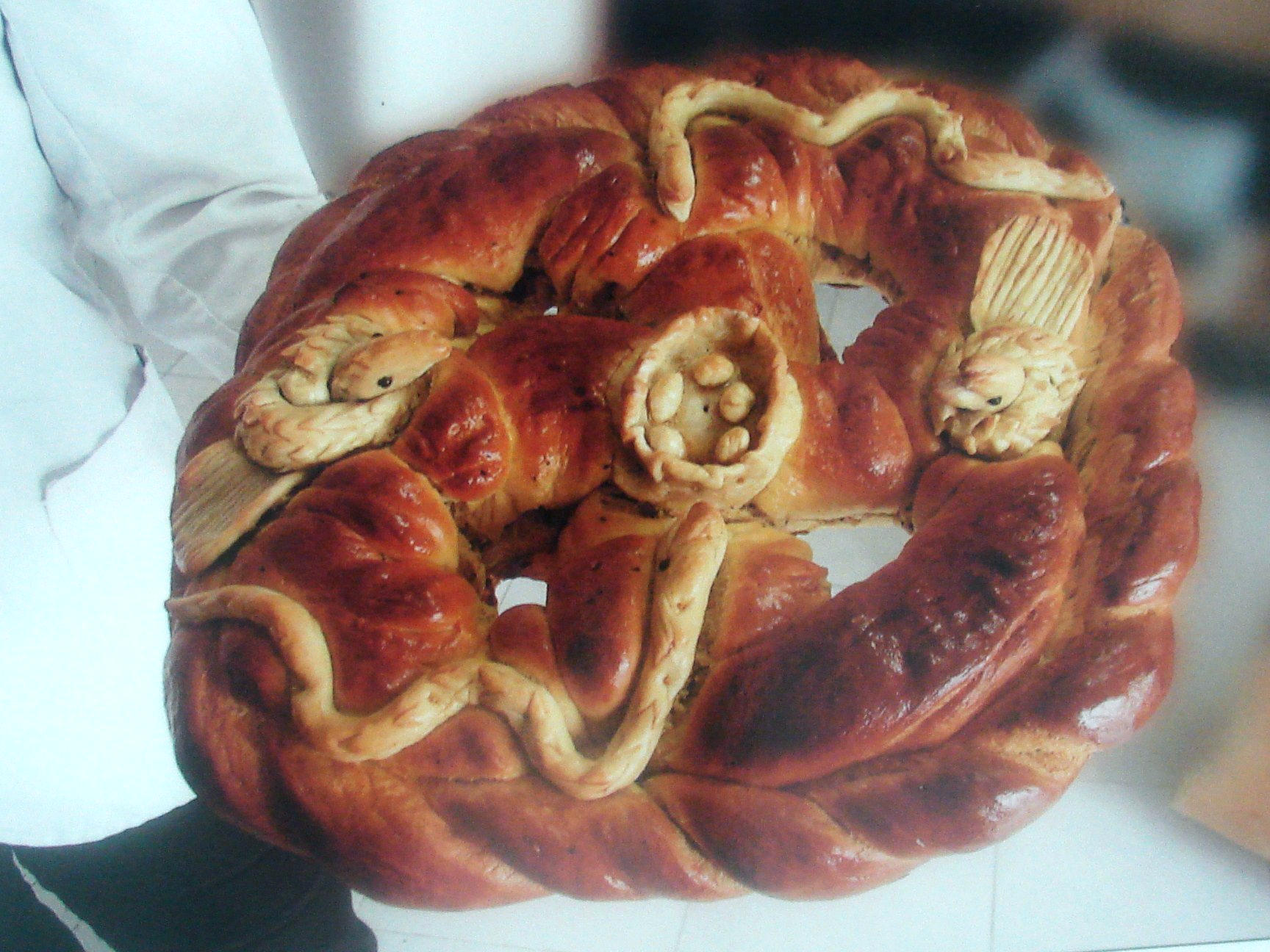 Kulaçi martesje